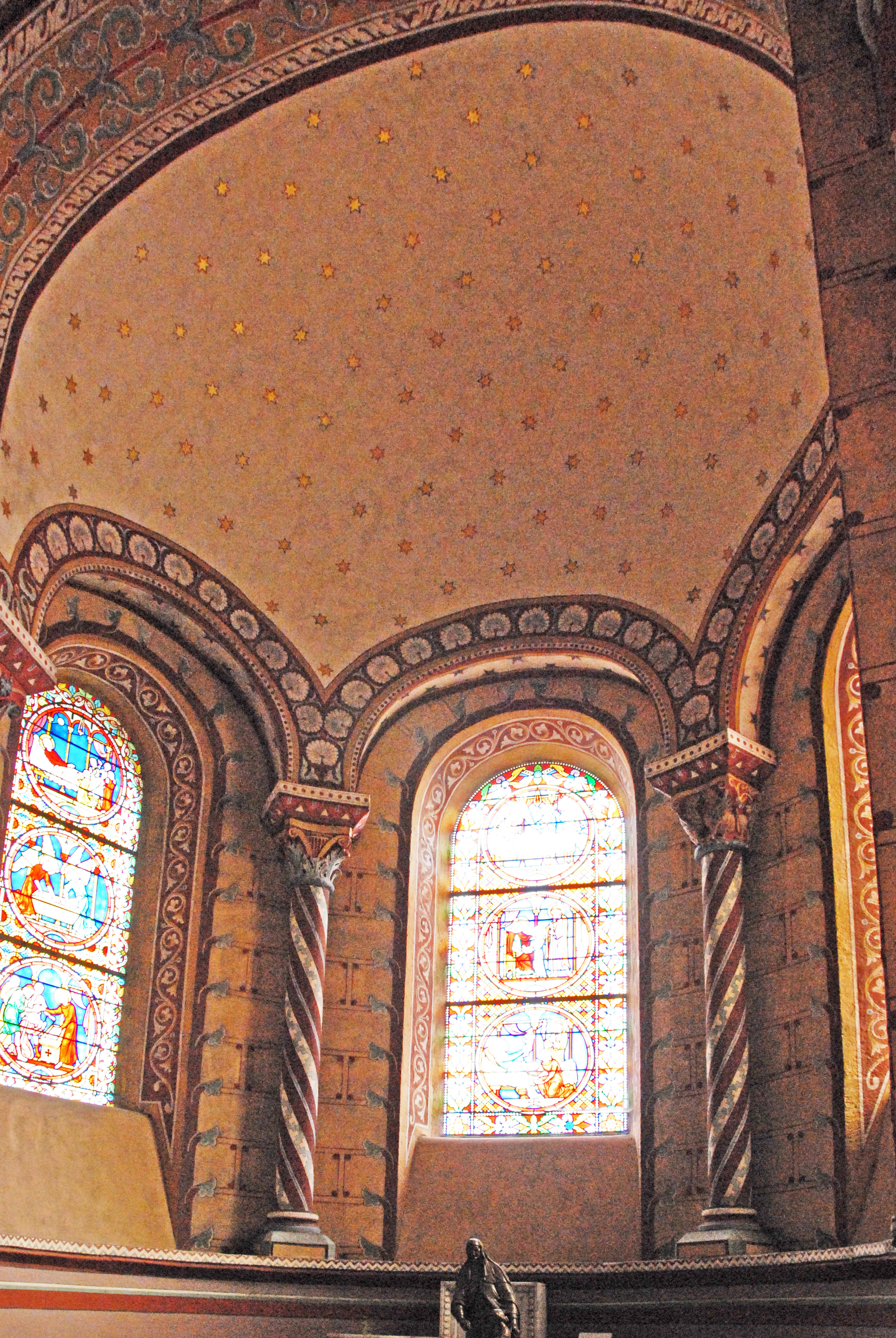 Kranzkaperlle